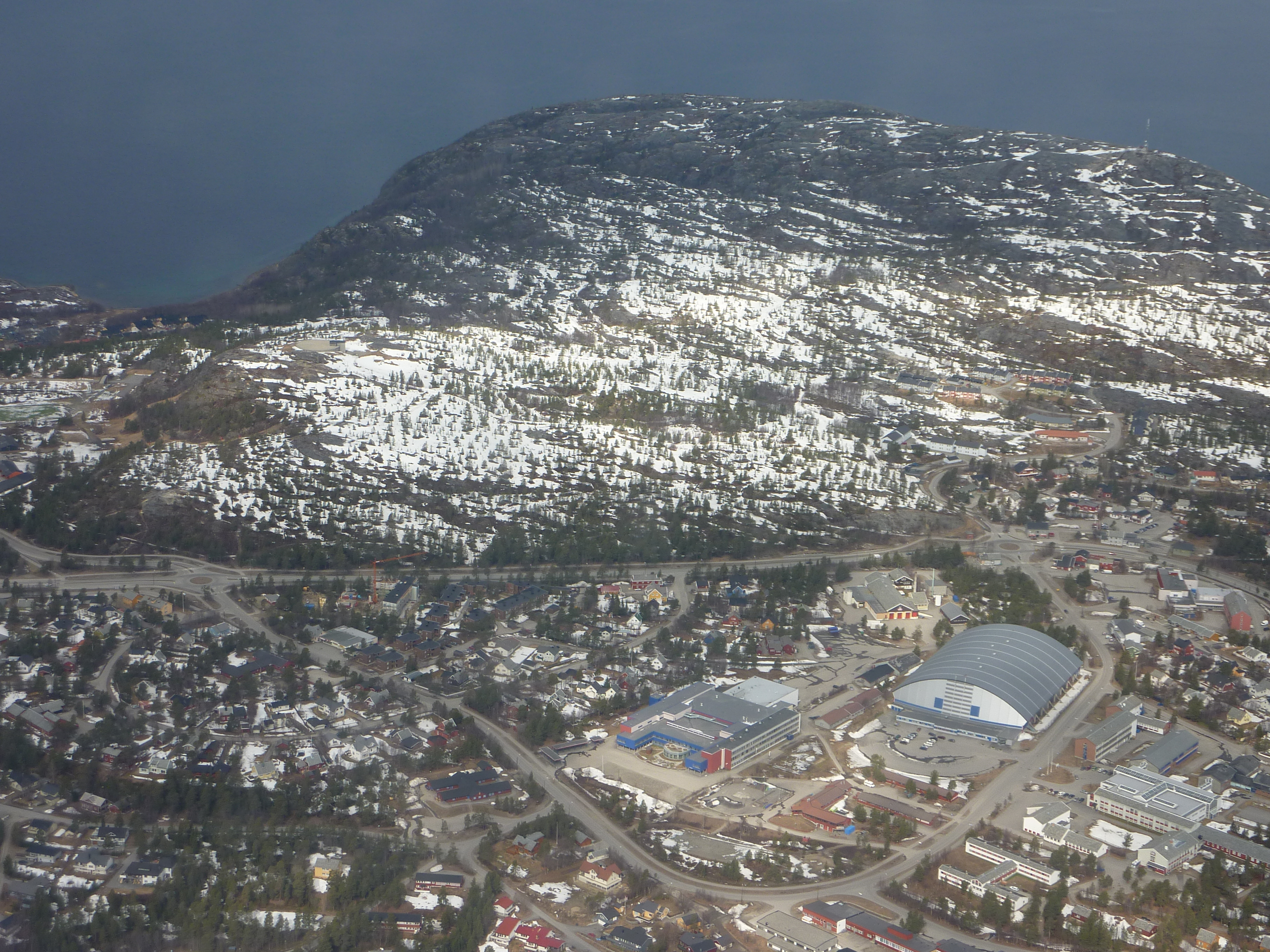 Komsa, Alta